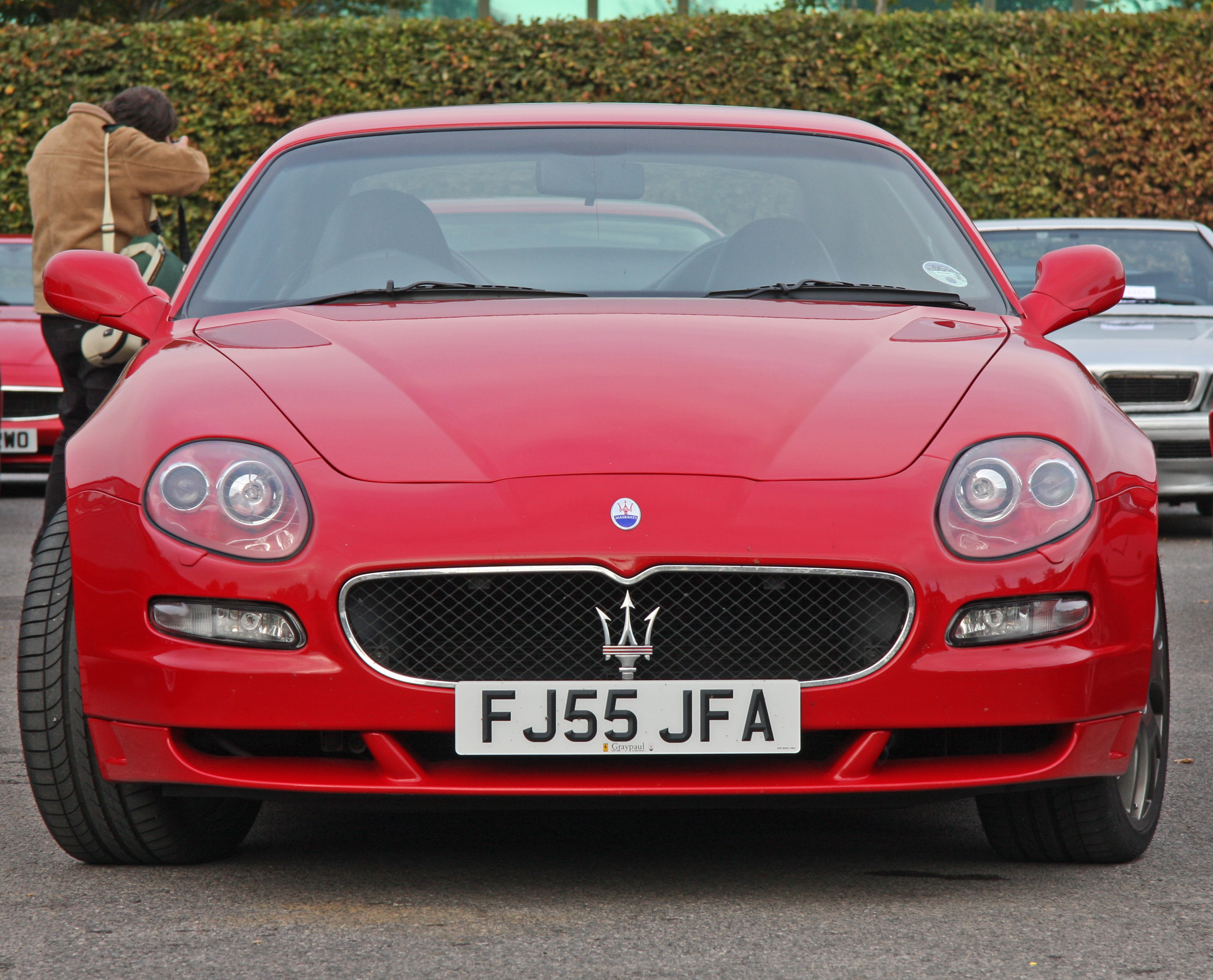 Maserati V8 Gransport